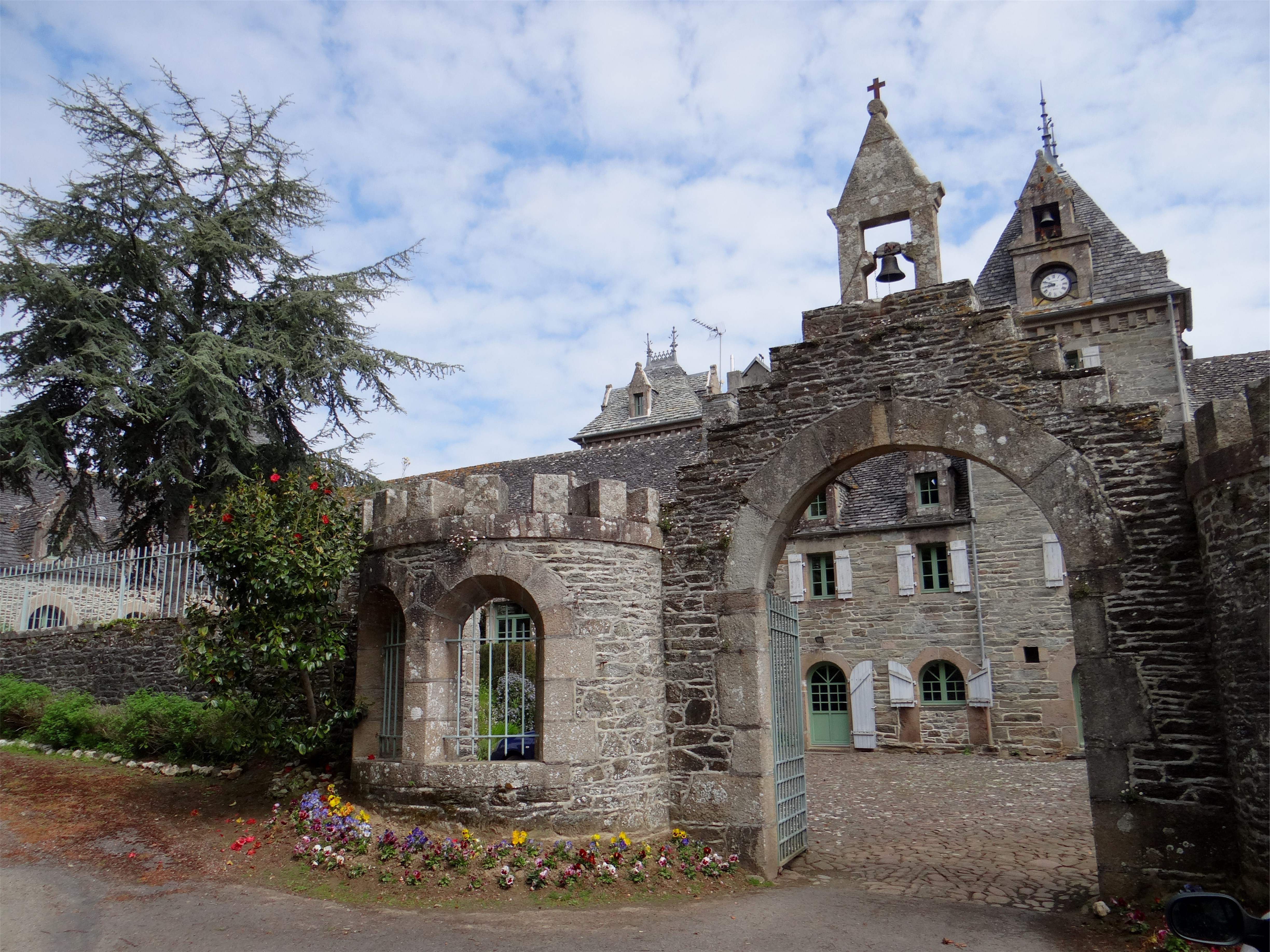 Manoir de l'Île-Blanche, Locquirec, Finistère, France